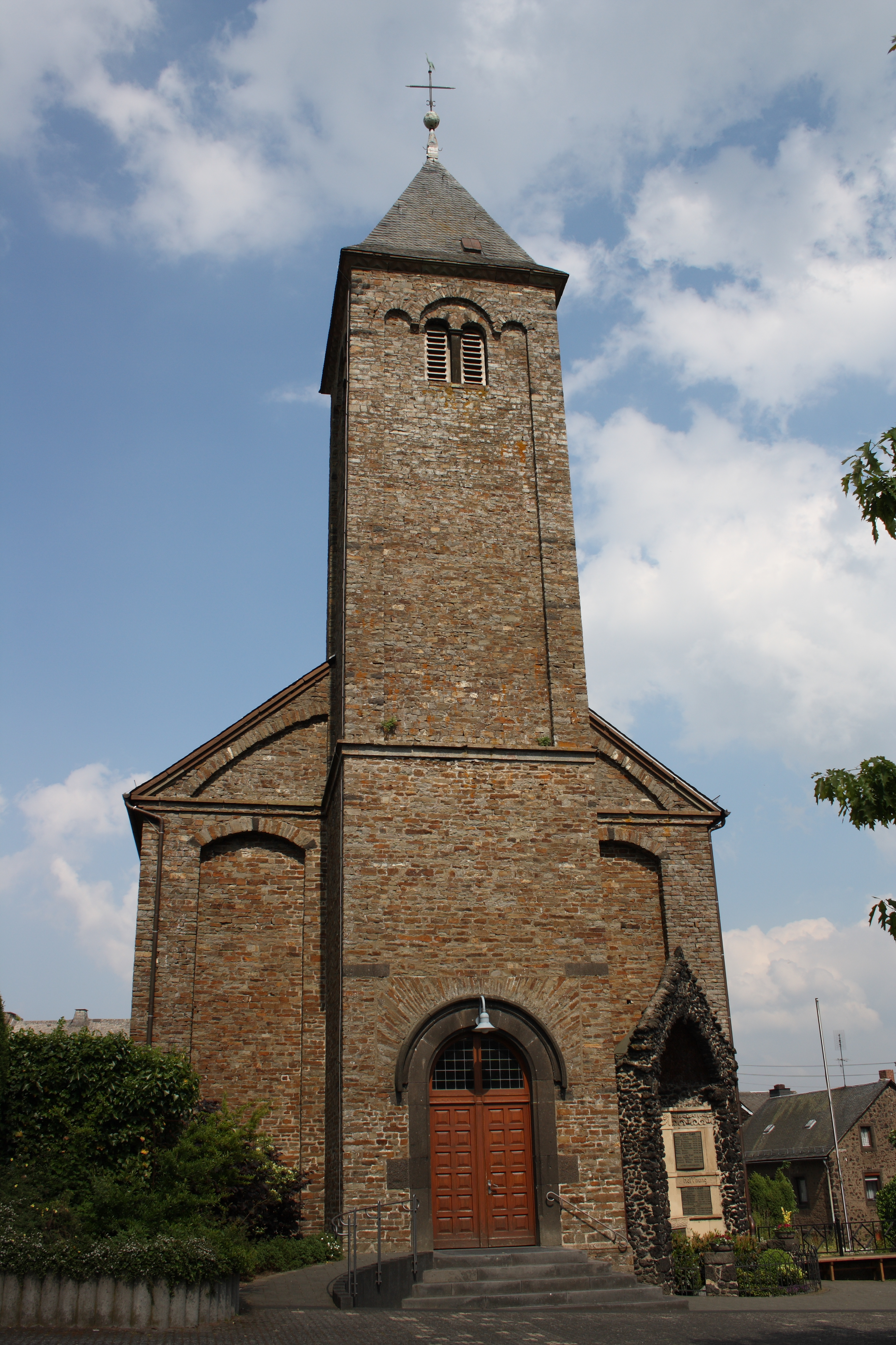 katholische Pfarrkirche St. Bartholomäus in Boos